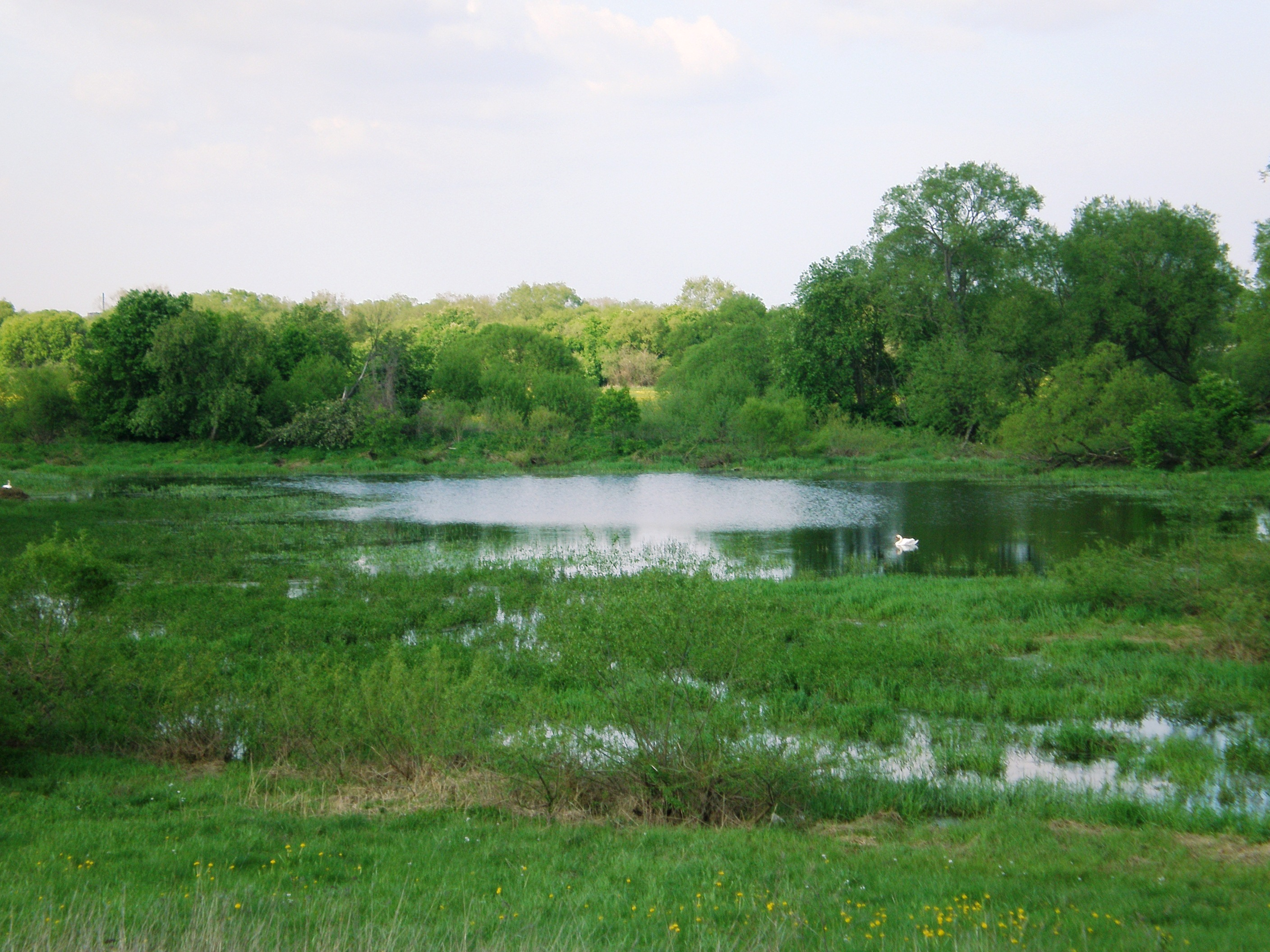 Senvagė prie Nevėžio upės. Kėdainių rajonas Foto: Hugo.arg 207.05.18